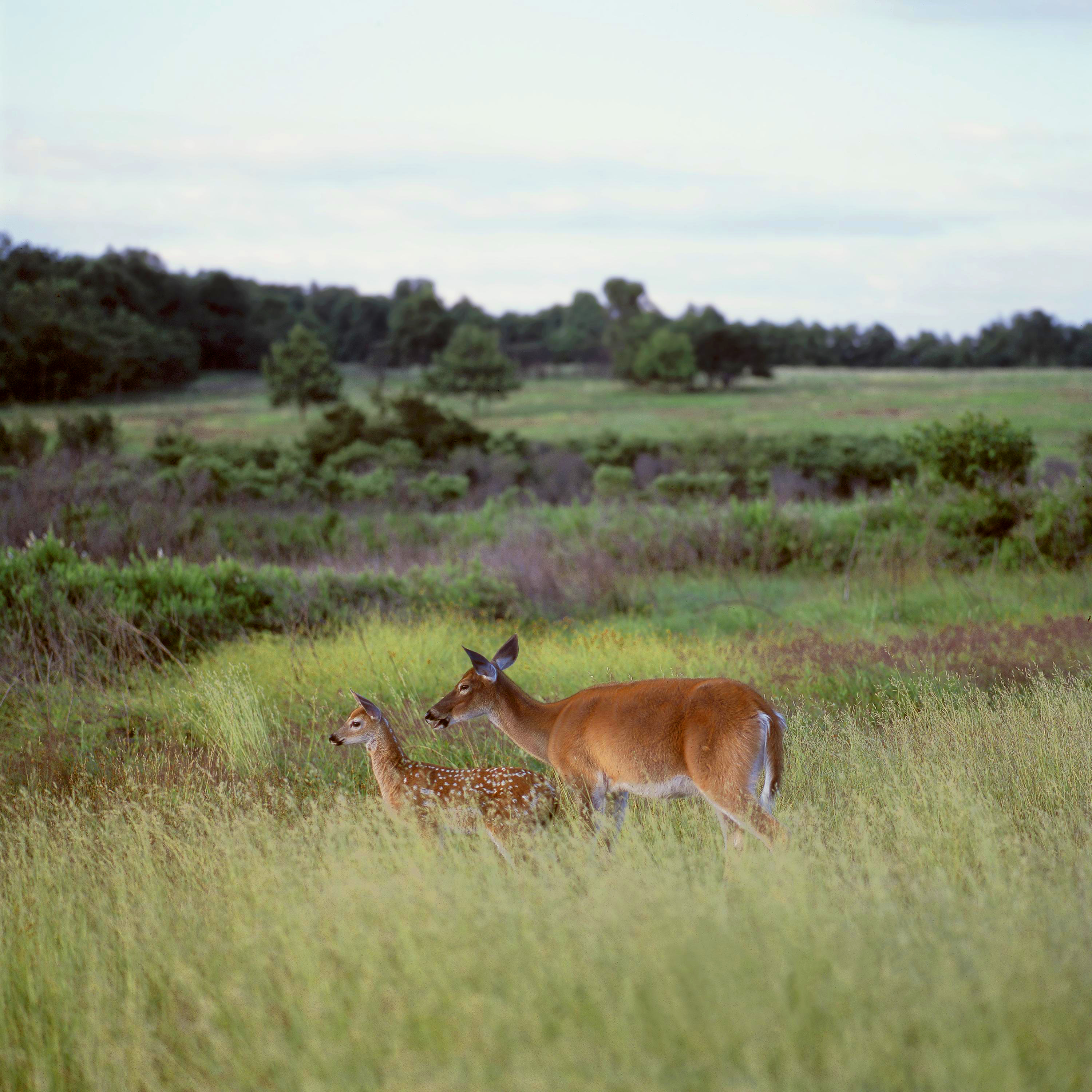 Deer Big Meadow